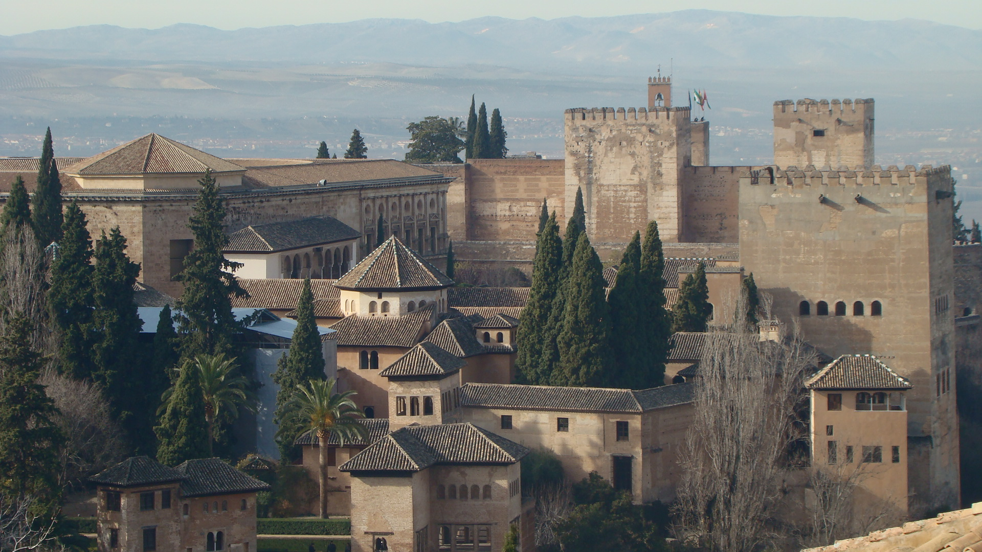 Vista de los Palacios nazaríes de la Alhambra, desde el Generalife